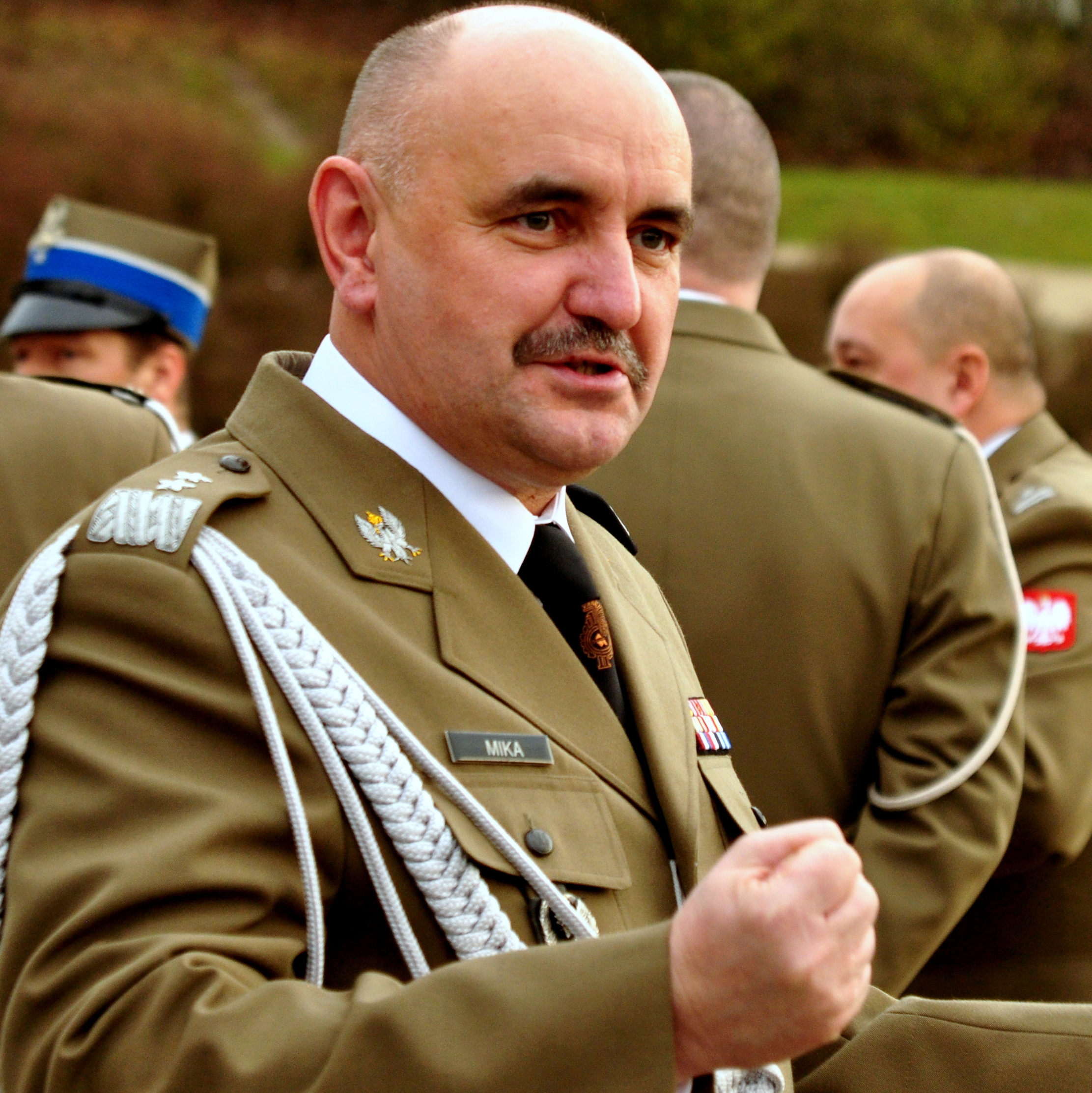 Jarosław Mika, generał dywizji SZ RP w trakcie rozmowy.